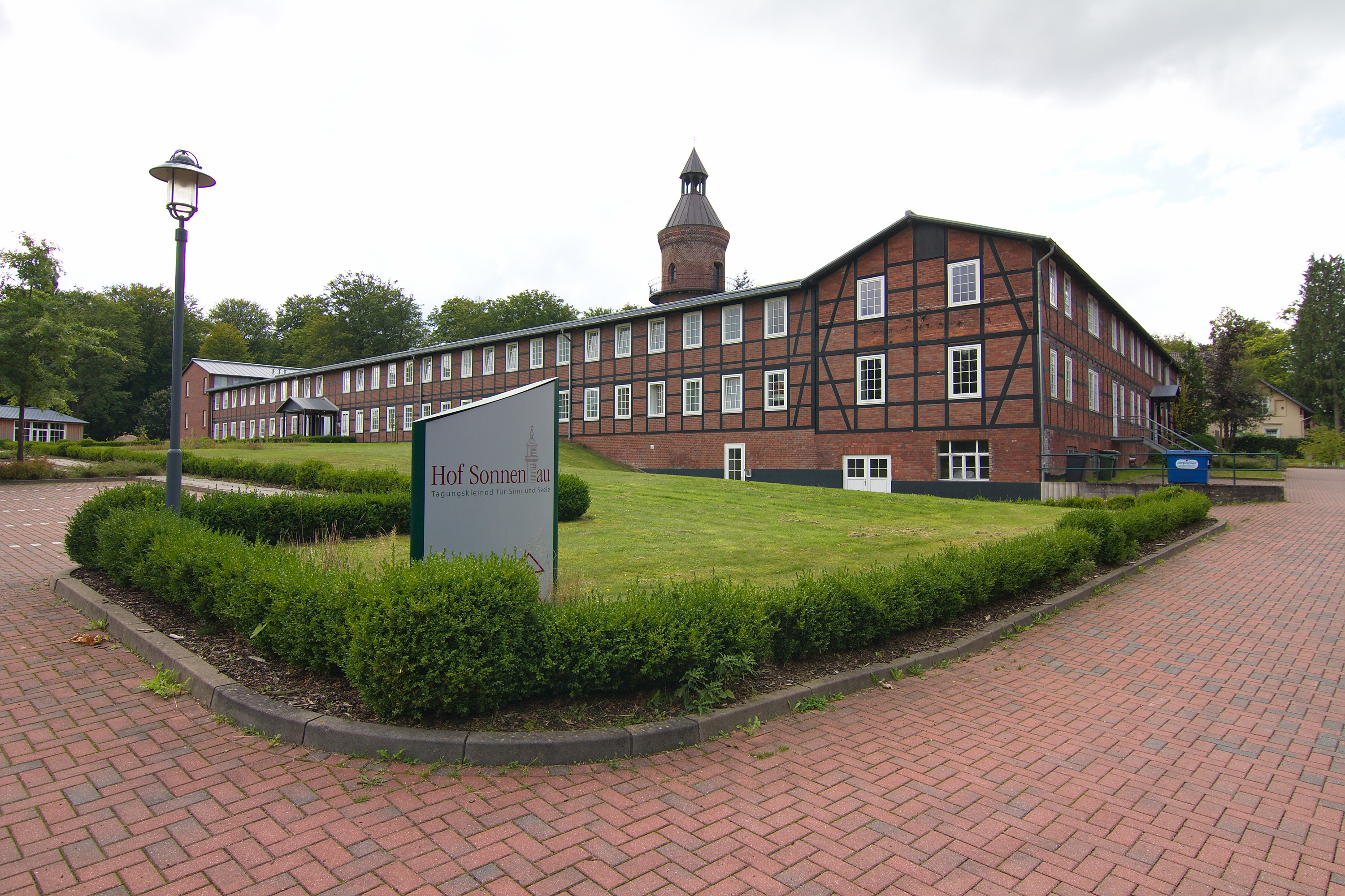 Ehemalige Honig- und Wachswarenfabrik Sonnentau in Visselhövede, Niedersachsen, Deutschland